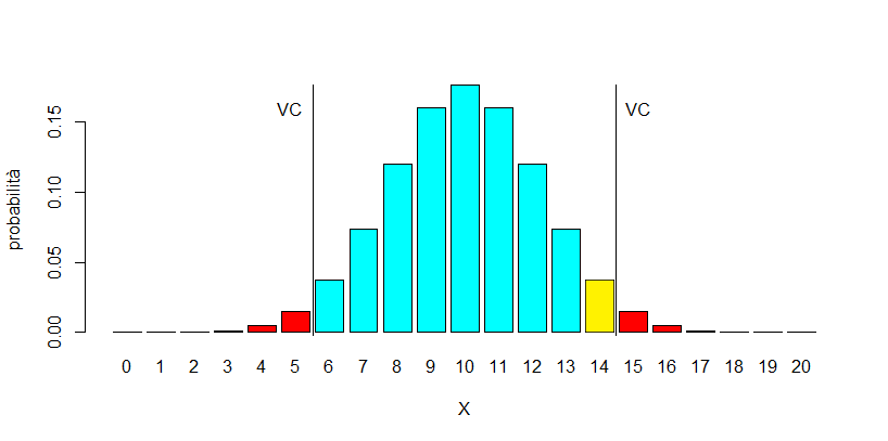 raffigurazione di un test delle ipotesi binomiale